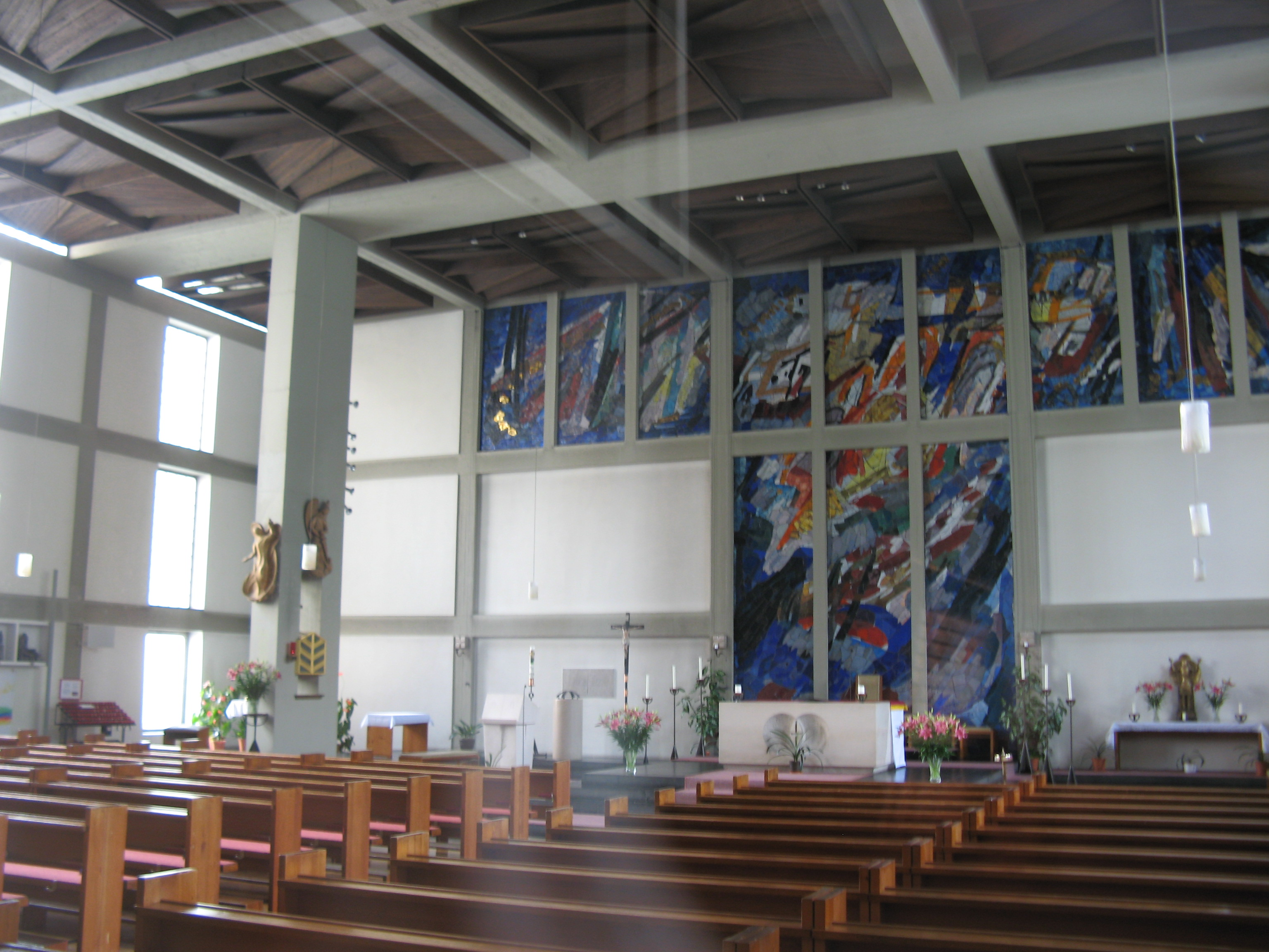 Innenraum der Pfarrkirche zur hl. Familie (1964/65) von Clemens Holzmeister, Puchsbaumplatz, Wien-Favoriten